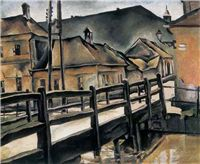 Konštantín Bauer - Garbiarska ulica, Košice